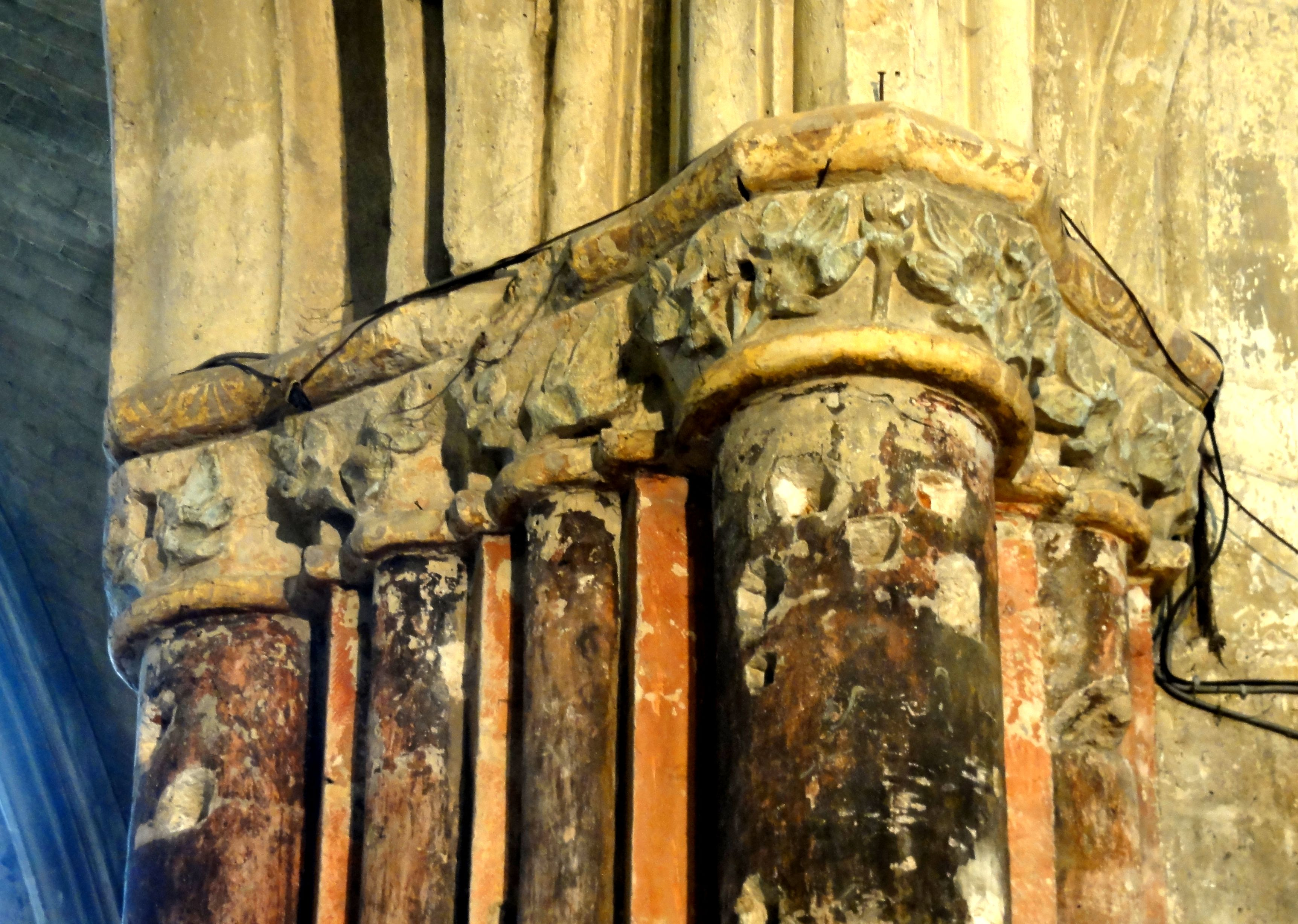 Chœur, supports côté nord.